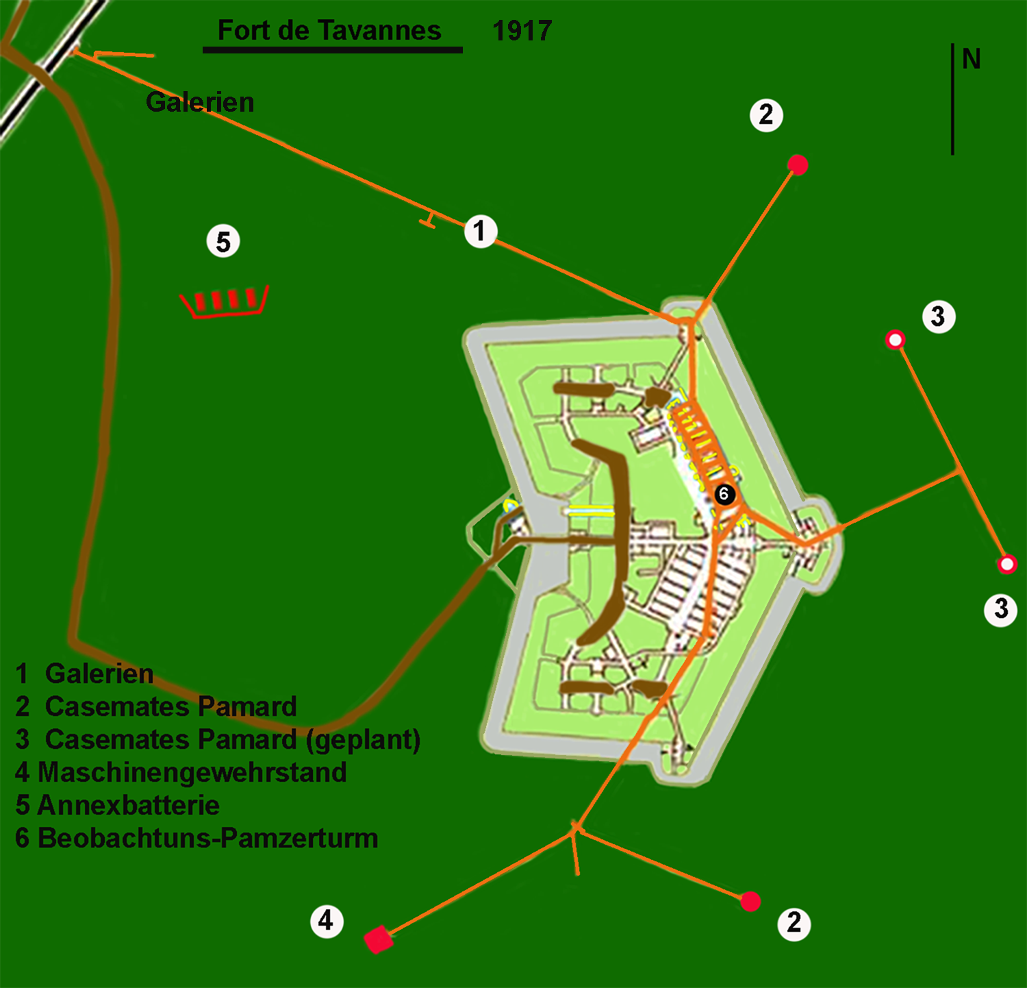 Plan des Fort de Tavannes 117 mit den Galerien